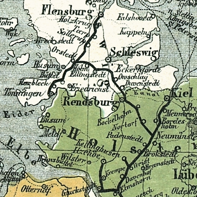 Ausschnitt Neumünster-Flensburg aus der Bahnkarte_Deutschland_1861